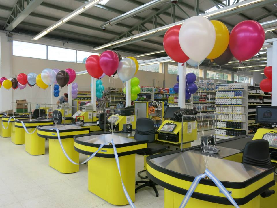 laprida inaugaracion